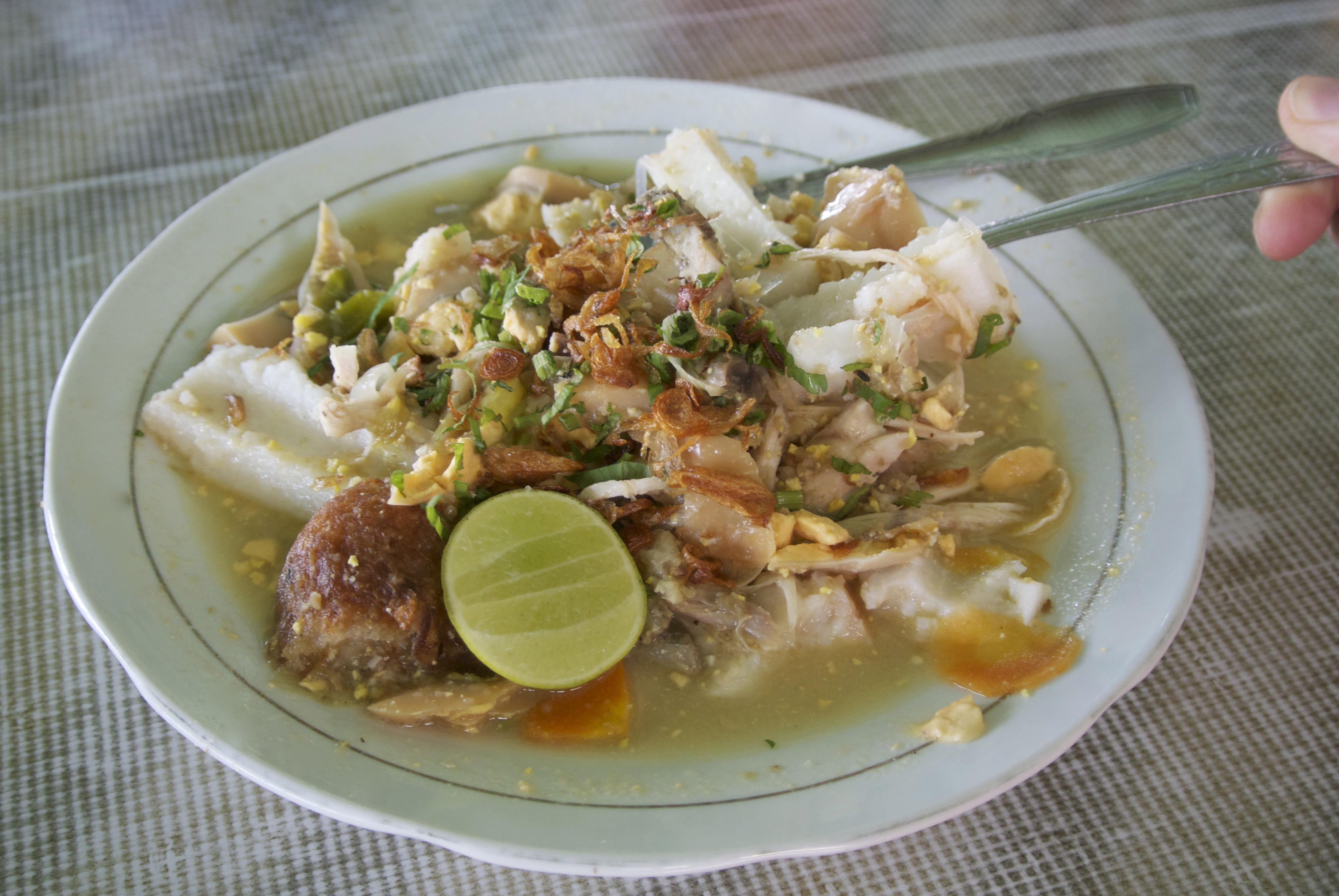 Soto Banjar Pak Amat, Banjarmasin